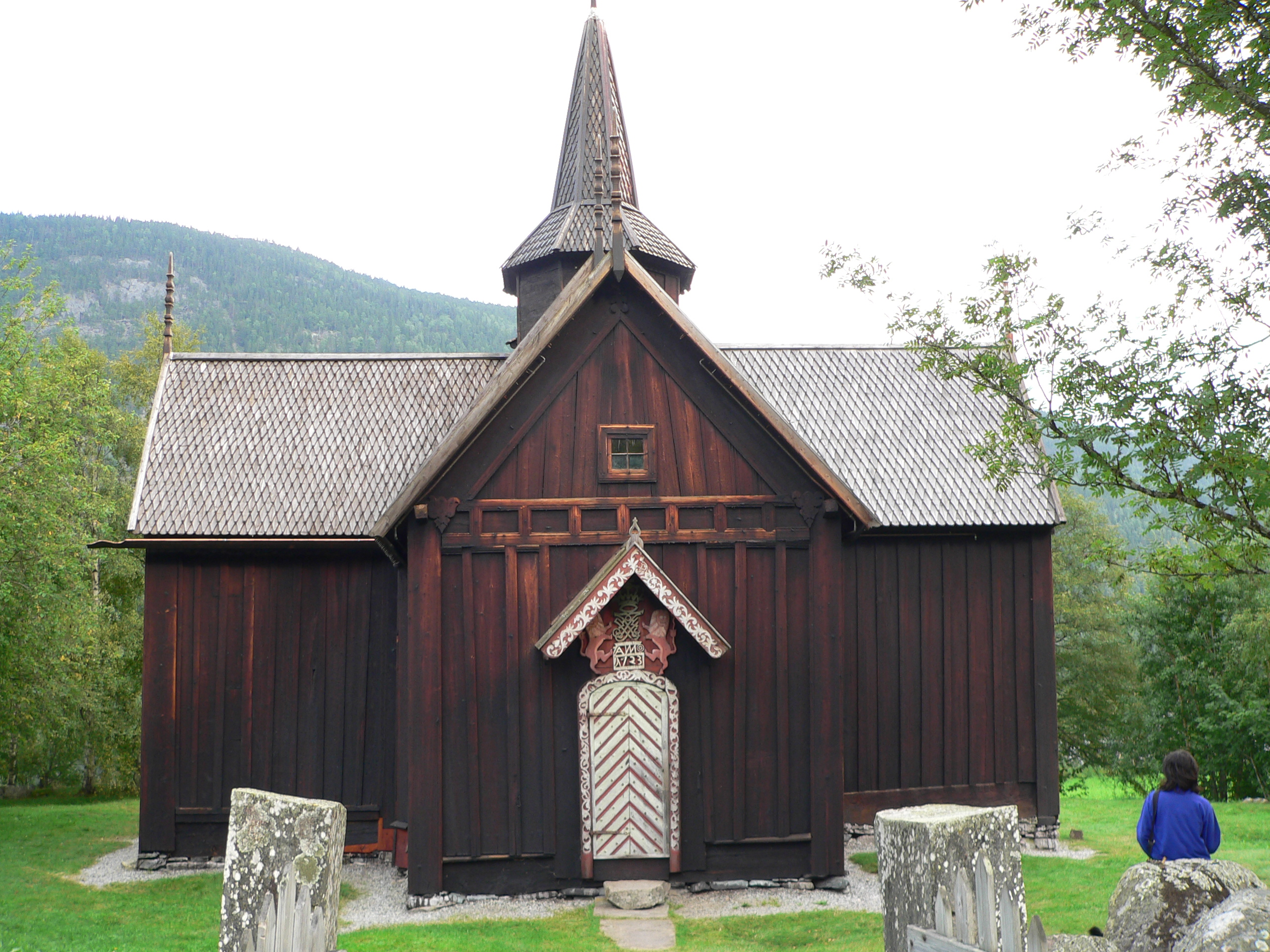 no: Nore stavkyrkje Nore stave church